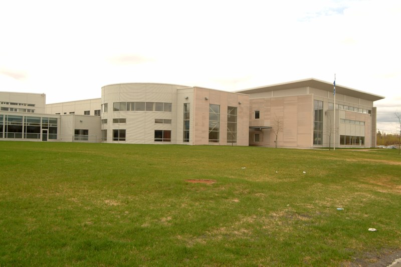 Campus du Cégep régional de Lanaudière à Terrebonne, au Québec.